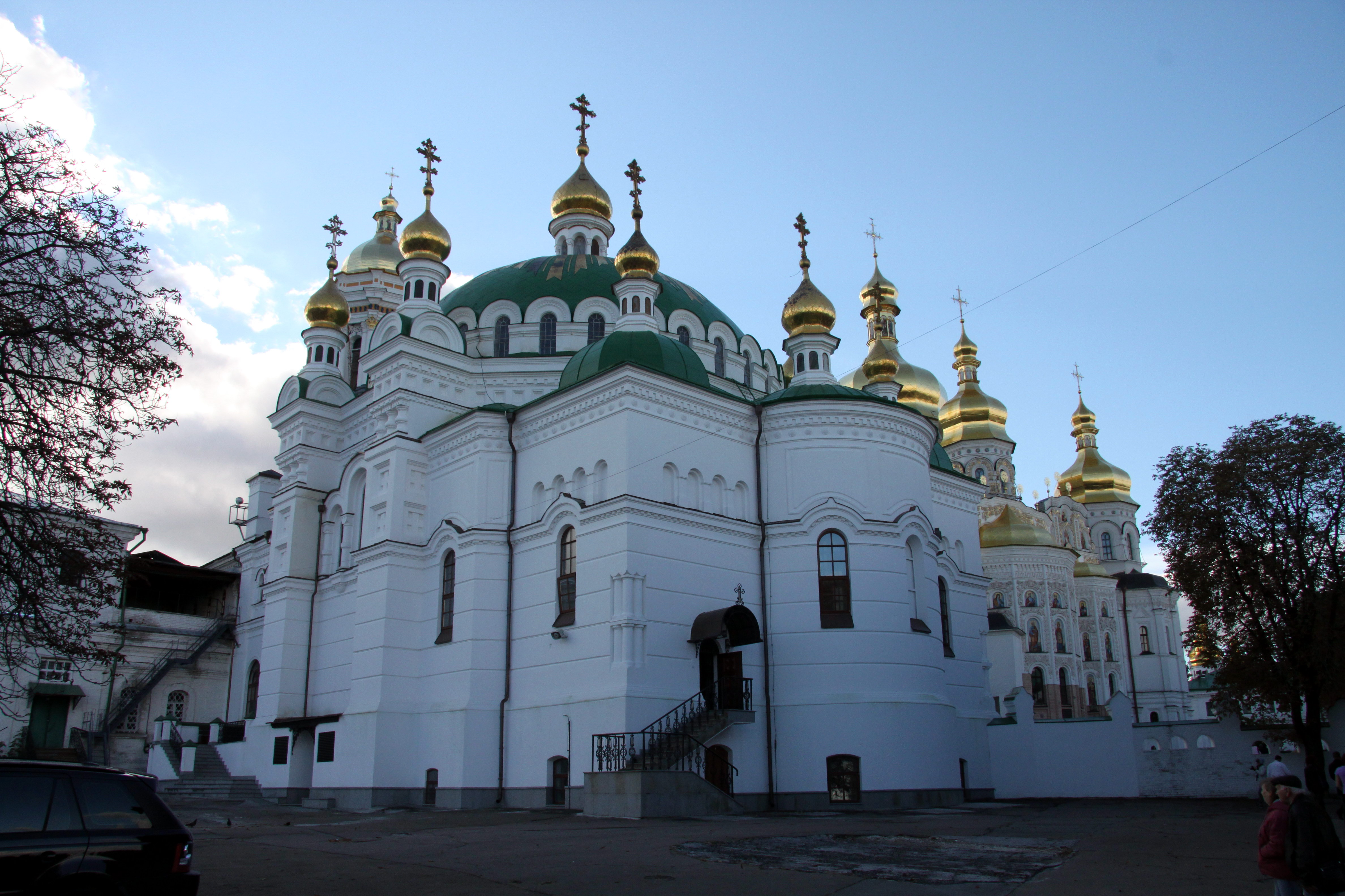 Палата трапезна з церквою Антонія і Феодосія, Київ, Лаврська вул., 9